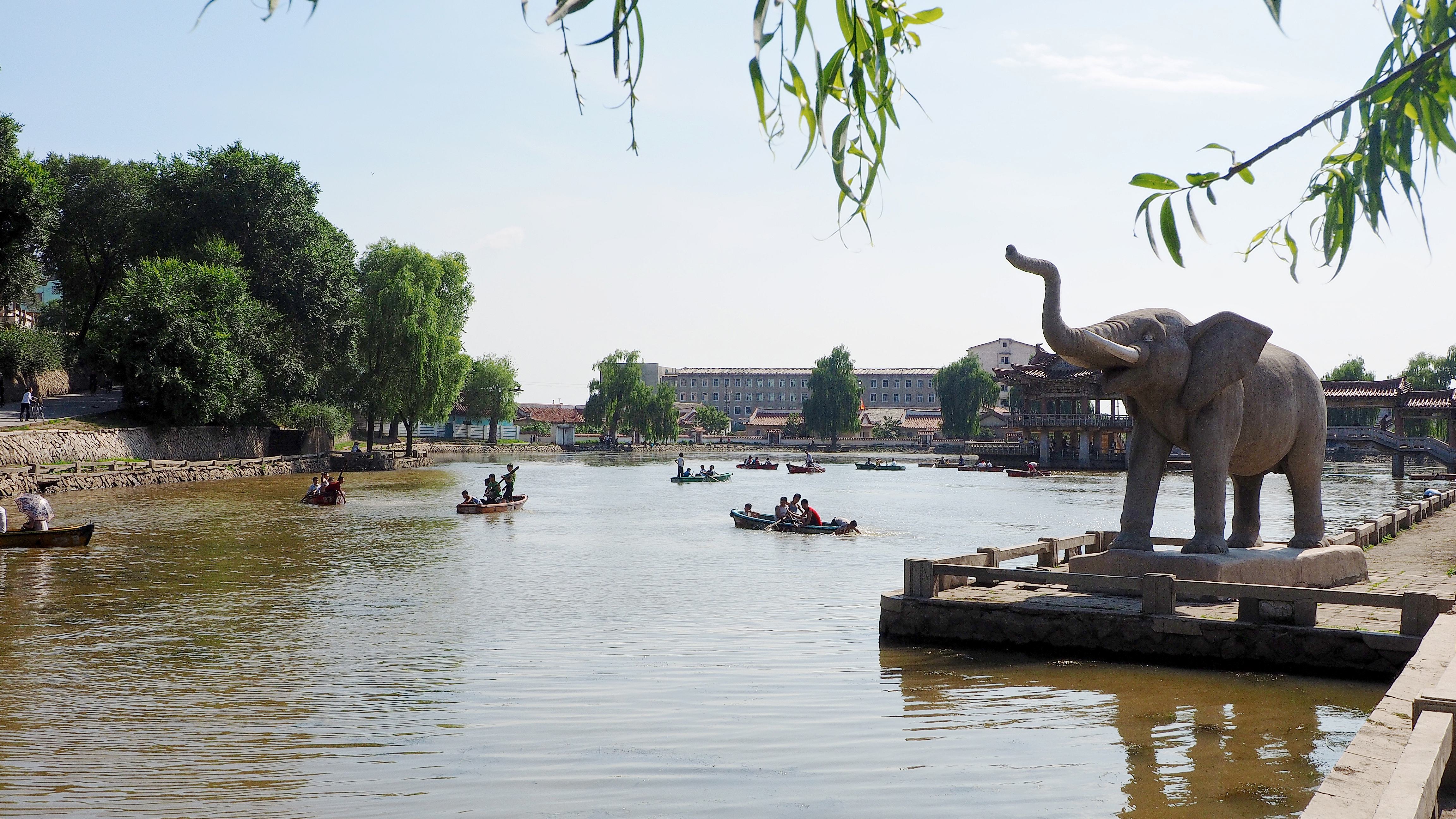 Sariwon, DPRK